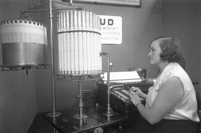 Die Eröffnung der grossen internationalen Büro-Ausstellung in den Ausstellungshallen am Kaiserdamm in Berlin! Eine neuartige Rechen- und Buchungs-Maschine auf der Ausstellung. Diese Rechenmaschine ist äusserst einfach in der Bedienung und kostet ca. 3.500.-, ein vielfaches weniger, wie die dieselbe Arbeit leistende Mehrzähl-Werkmaschine, welche 8 bis 13.000.- Mark kosten.